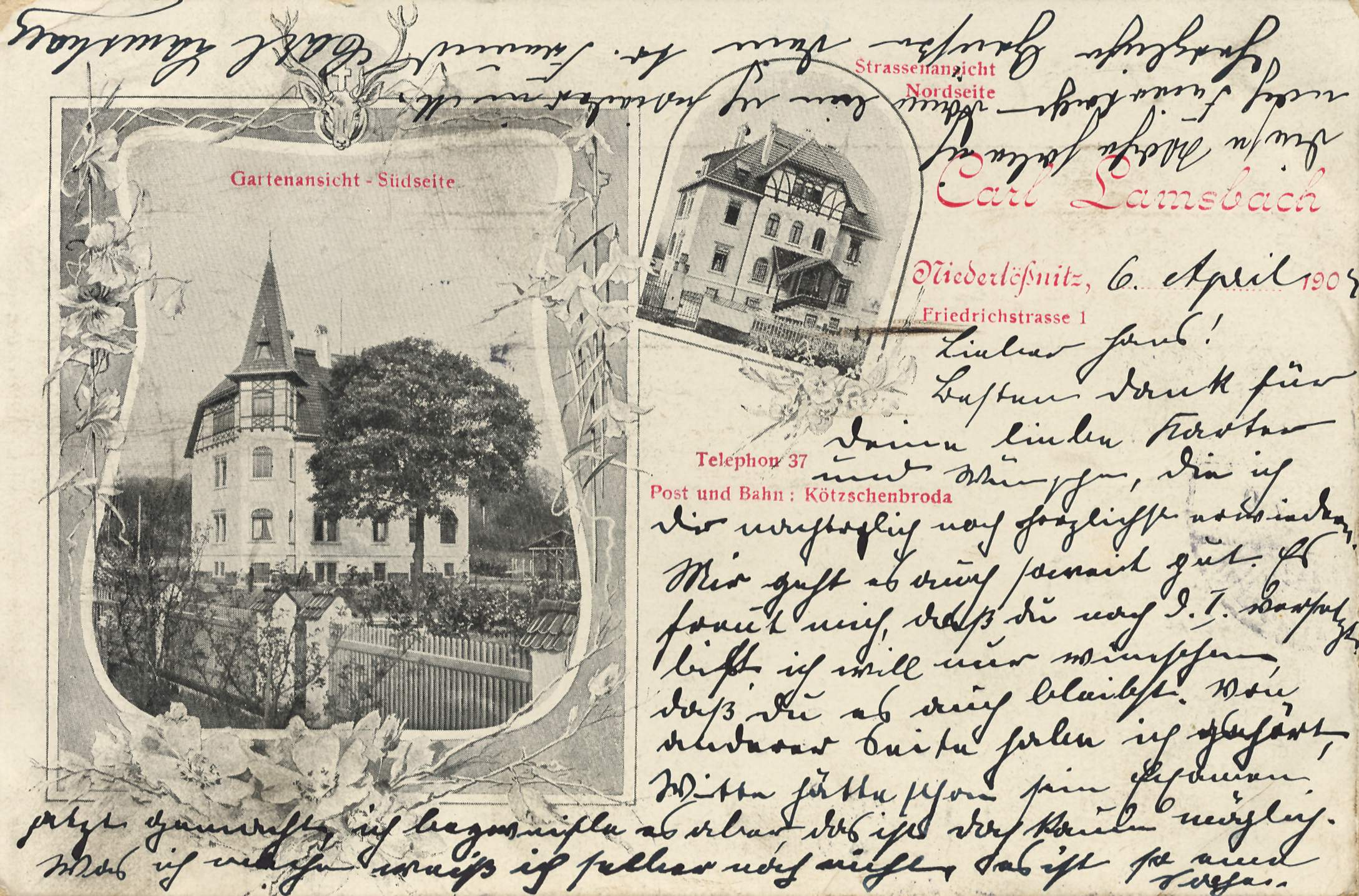 Friedrichstraße 1